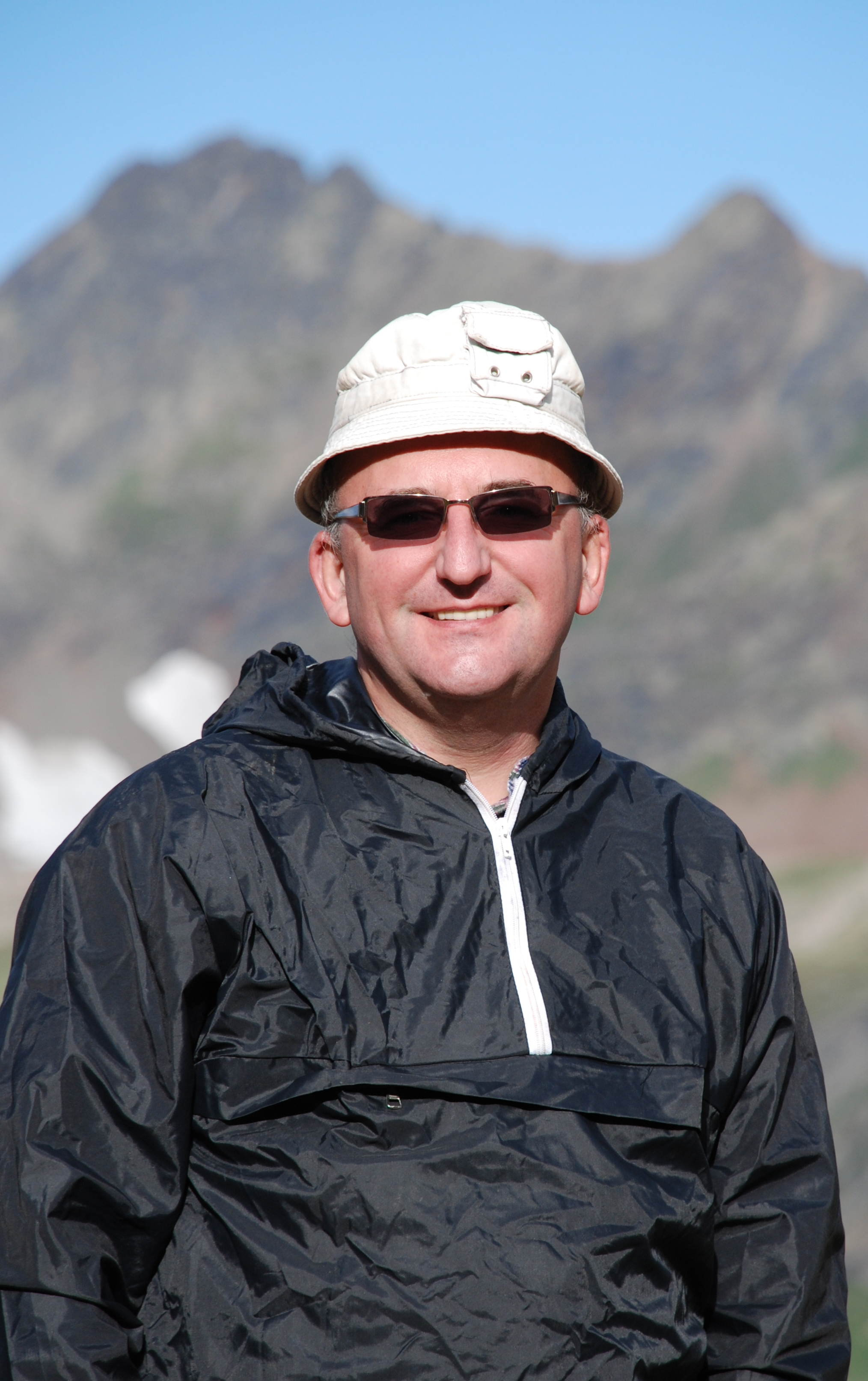 ks. Andrzej Witko